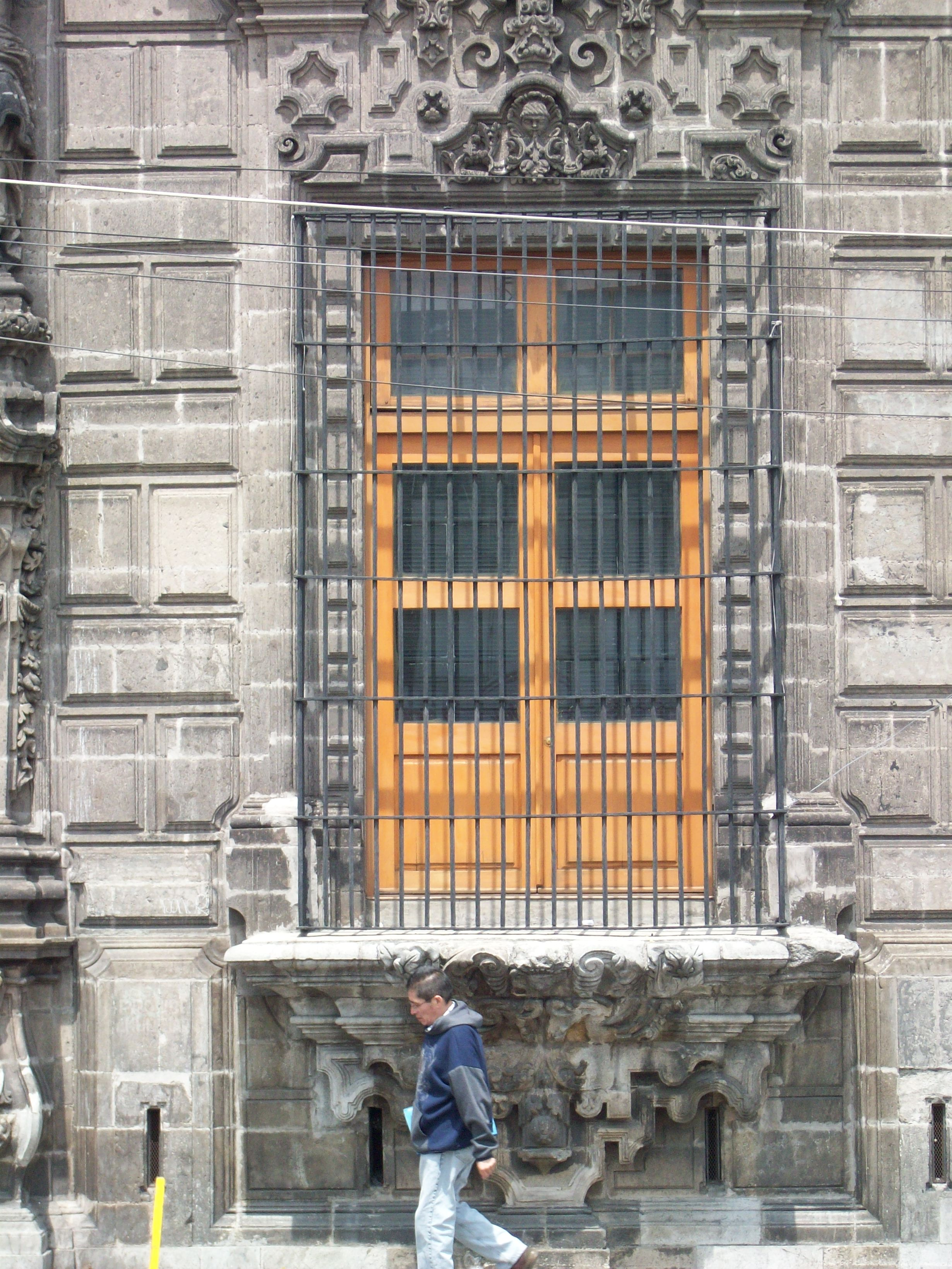 Casa de los Condes del Valle de Orizaba